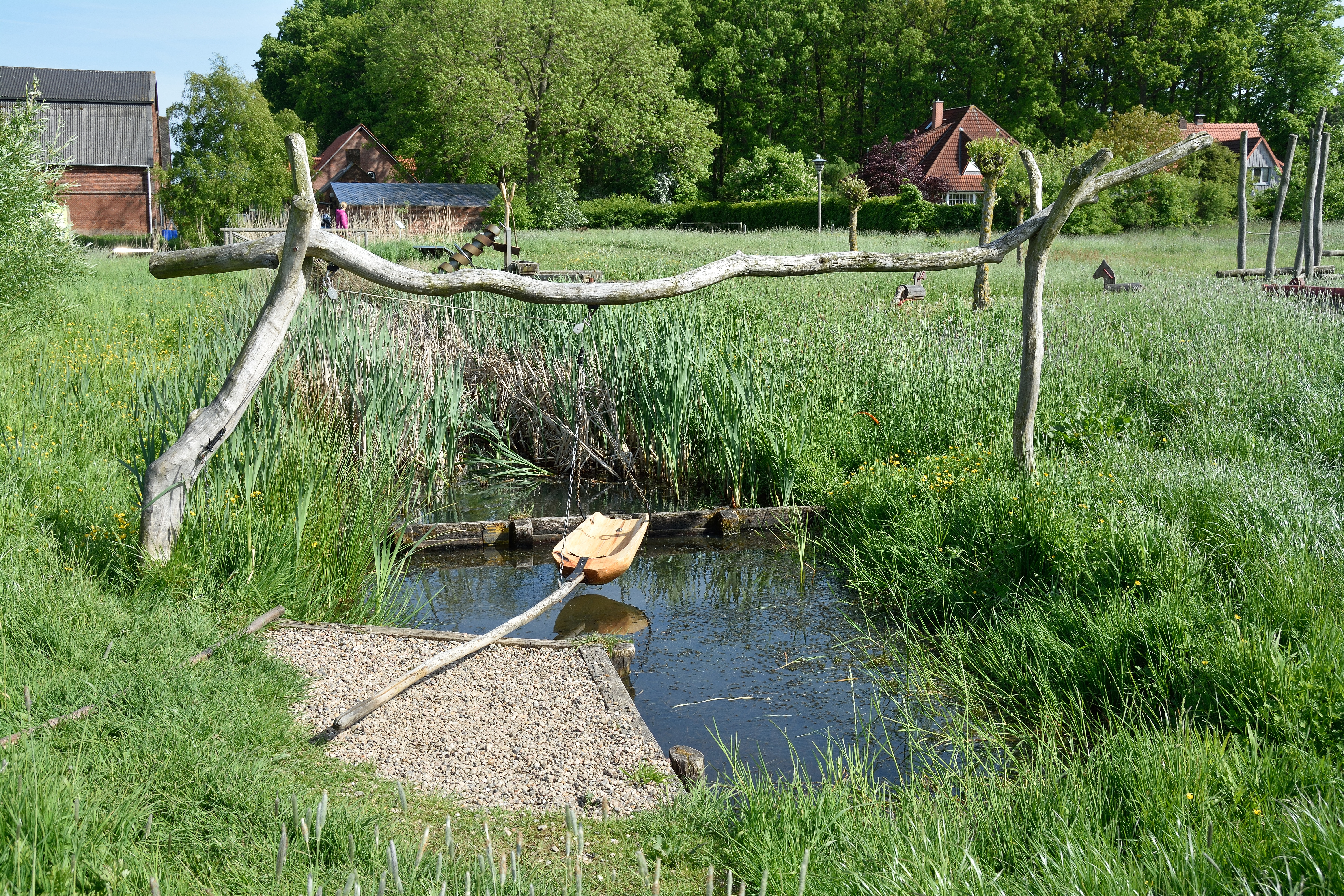 Haseldorf, Impessionen vom Naturerlebnisraum am Elbmarschenhaus Der Naturerlebnisraum liegt im Landschaftsschutzgebiet "LSG des Kreises Pinneberg"